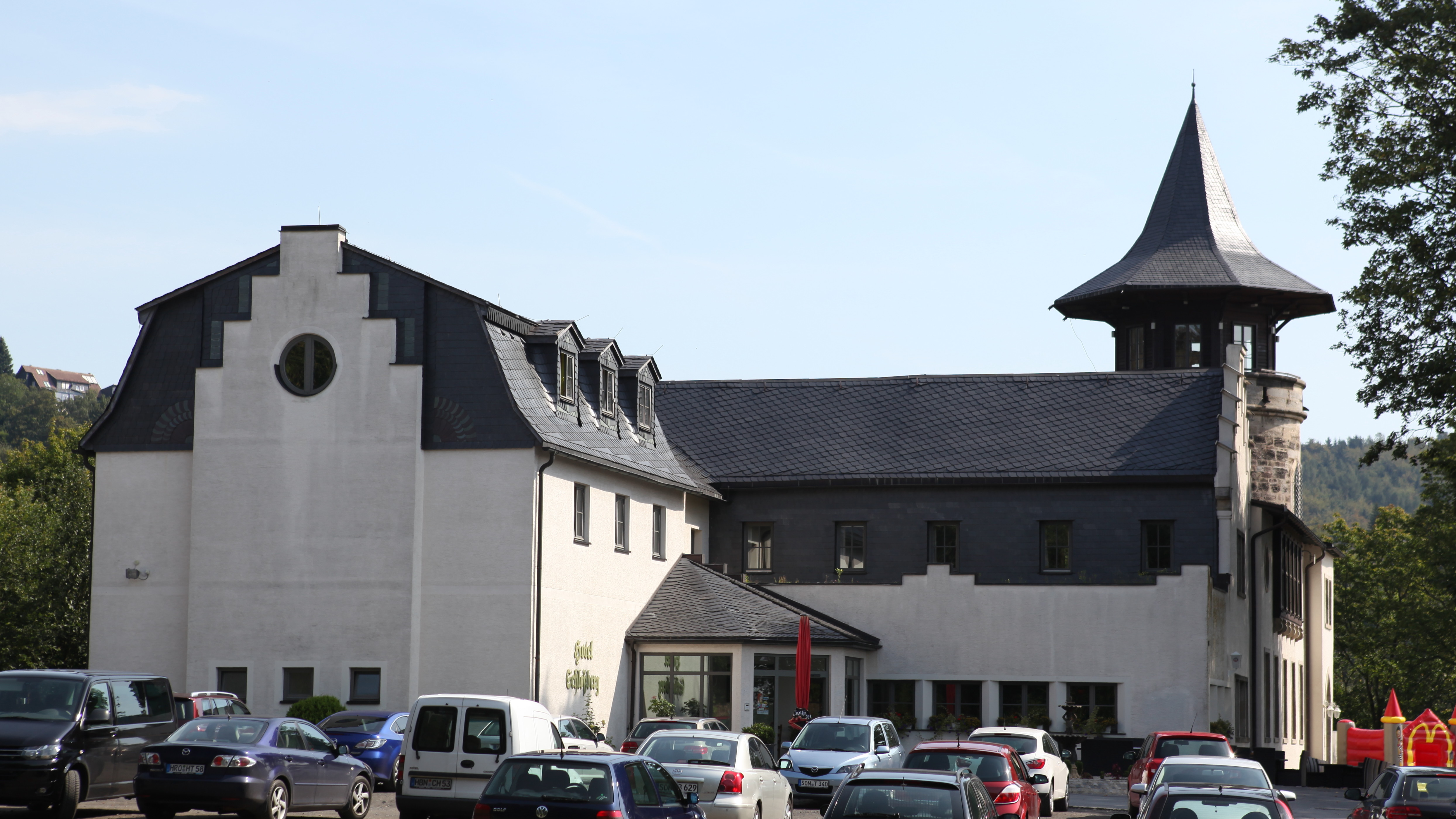 Schlossberggebäude, Massivbau mit Satteldach und Turm, 19./20. Jh., Sonneberg, Schlossbergstraße 1